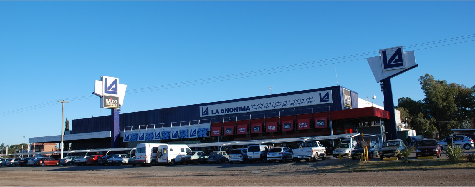 Hipermercado La Anónima ubicado en la ruta nacional 7. Junín, Argentina.